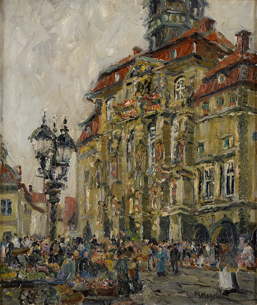 Markttag (vor dem Rathaus Lüneburg), signiert, Öl auf Leinwand, 68 x 58 cm